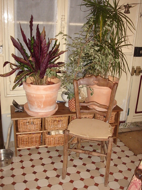 Cuisines, hôtel particulier XIXe, à Saint-Germain-en-Laye.